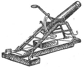 Аптычны апарат Ламаносава, створаны ў 1762 годзе